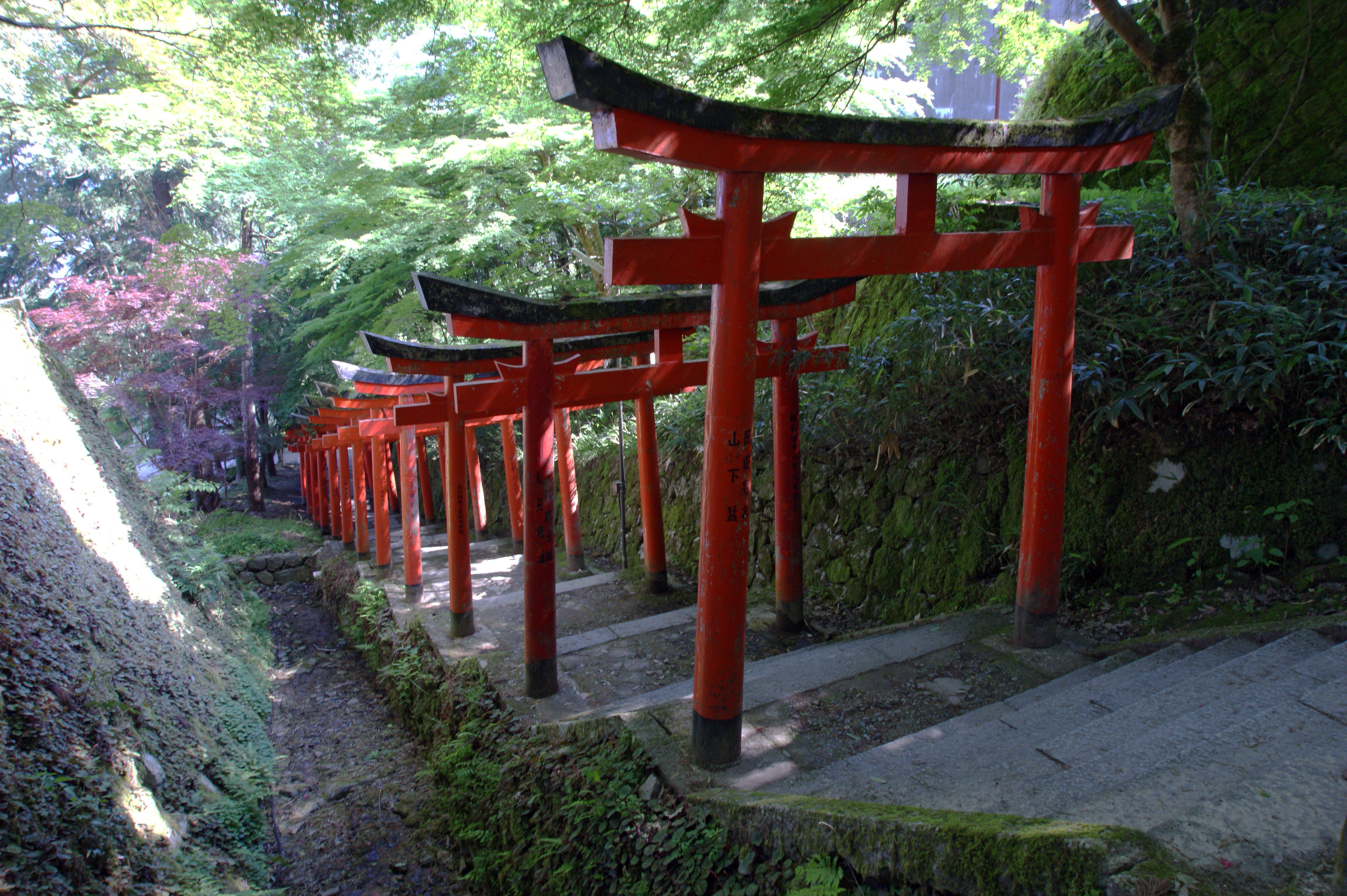 Arikoyama-inarijinja (Izushi Castle) in Toyooka, Hyogo prefecture, Japan